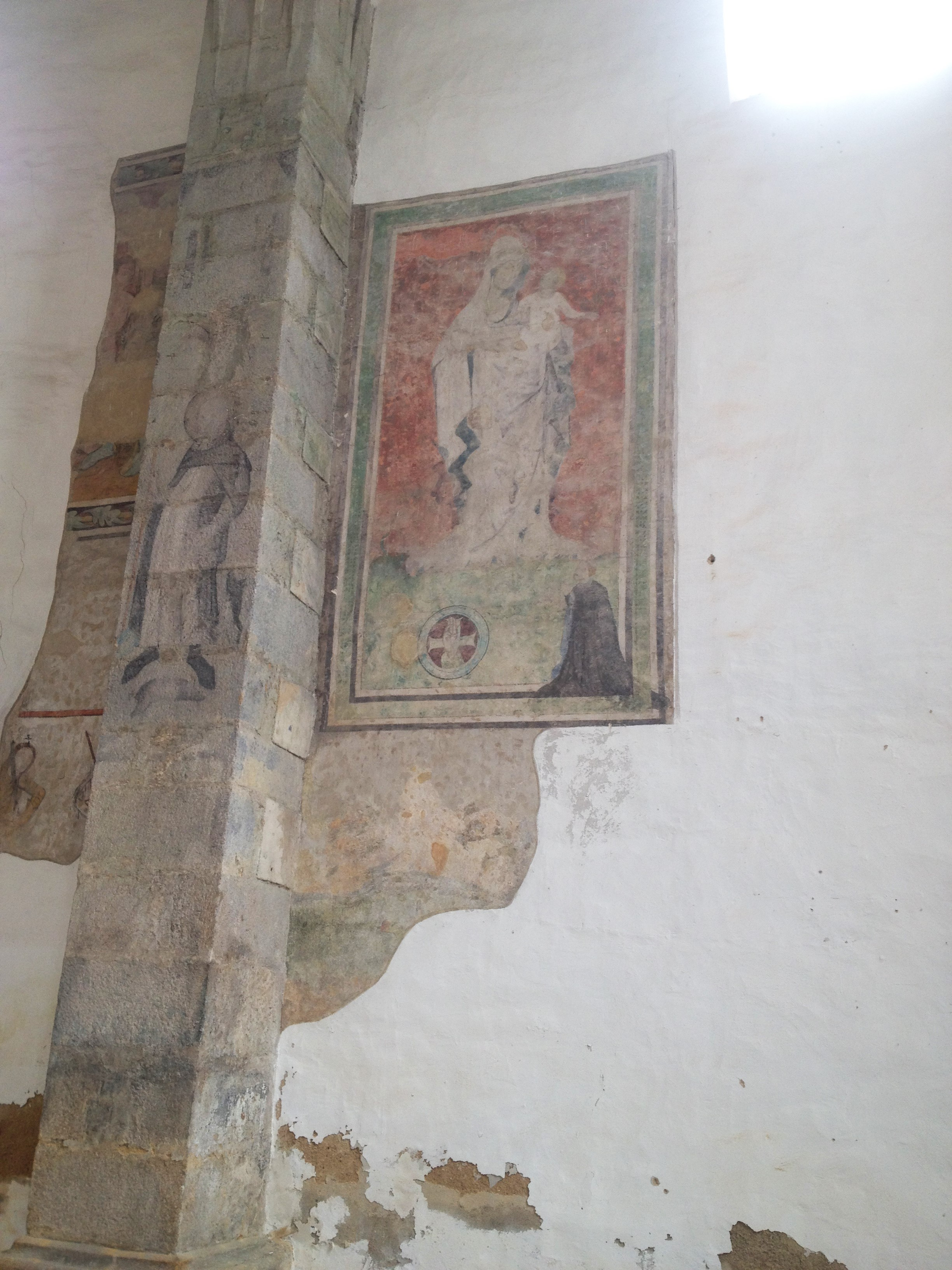 nastenne malby